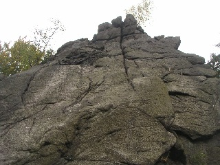 Tofana Harz Ostseite